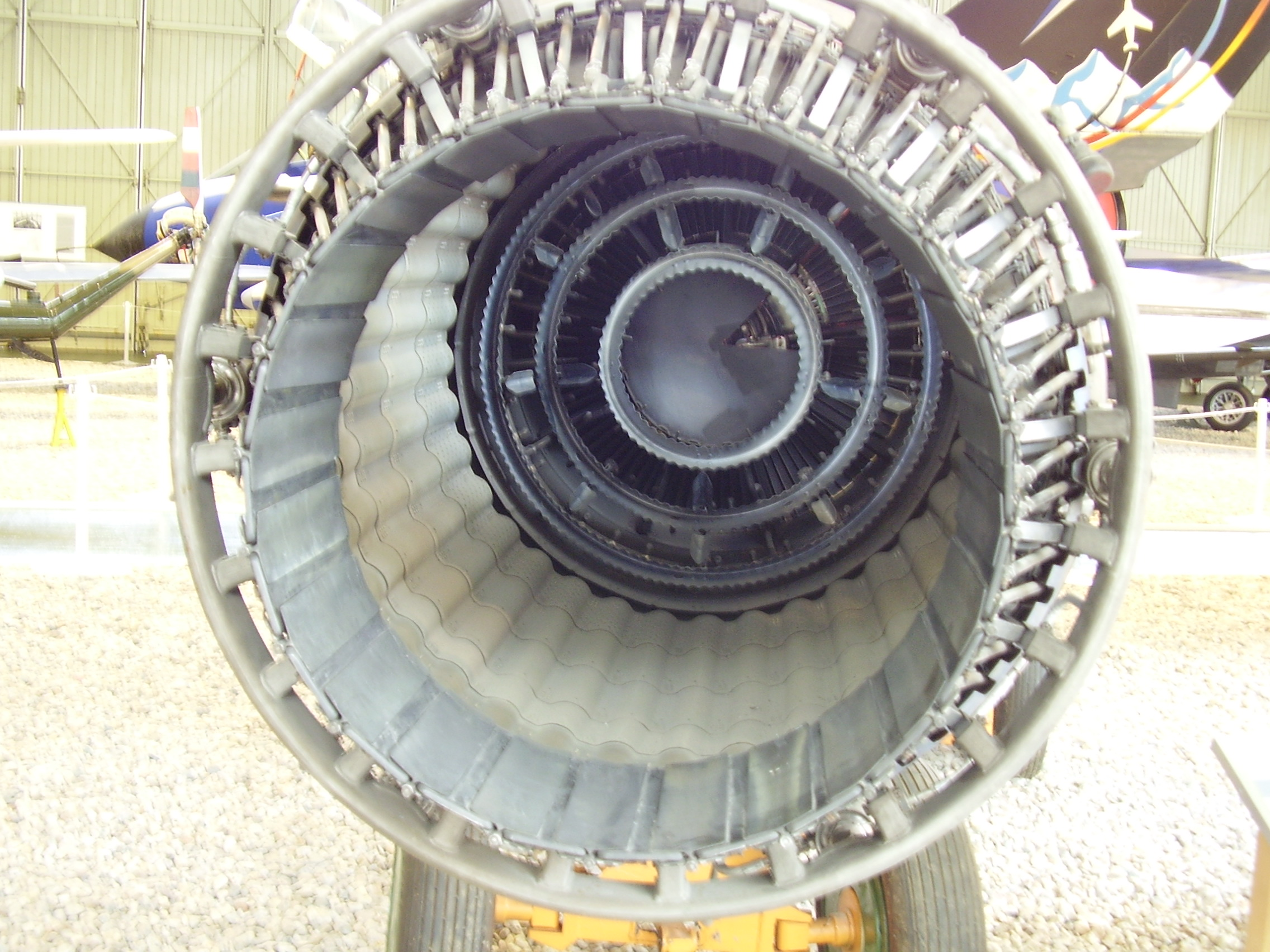 Luftwaffenmuseum der Bundeswehr; Airforce Museum of the Bundeswehr; Berlin-Gatow, Ljulka AL-21 F3